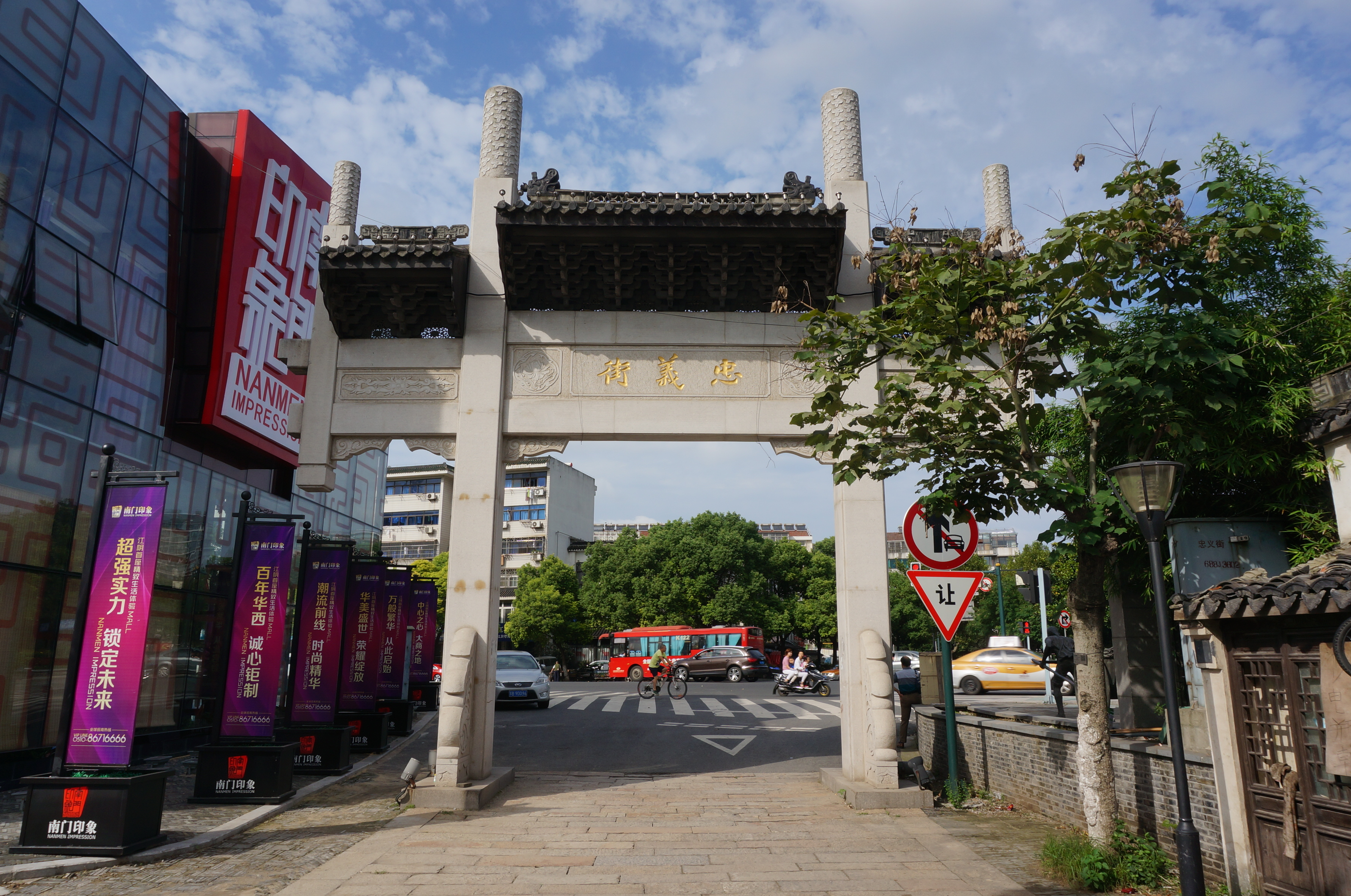 忠义街，北端牌坊南侧。